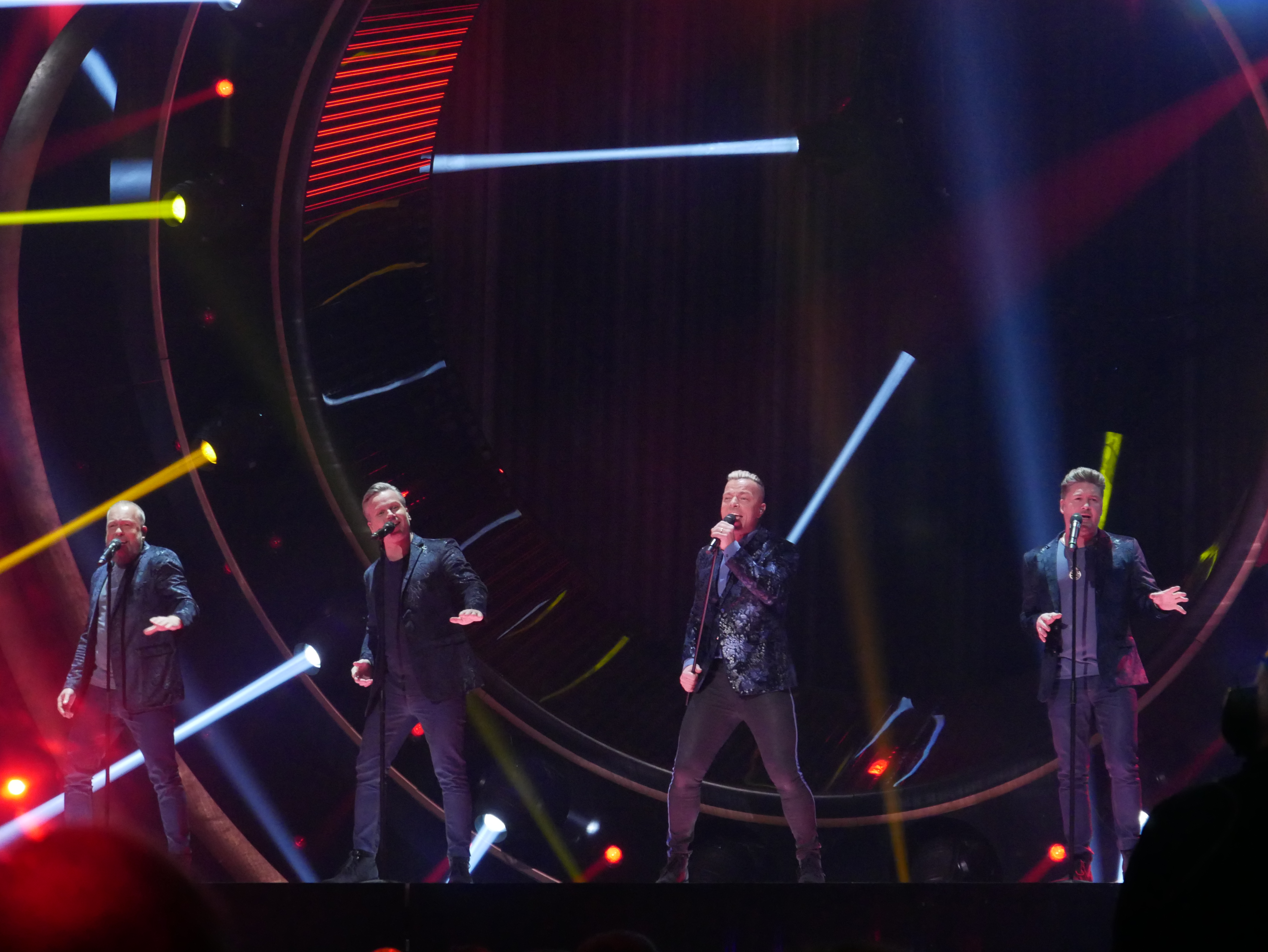 Melodifestivalen 2019 i Nyköping